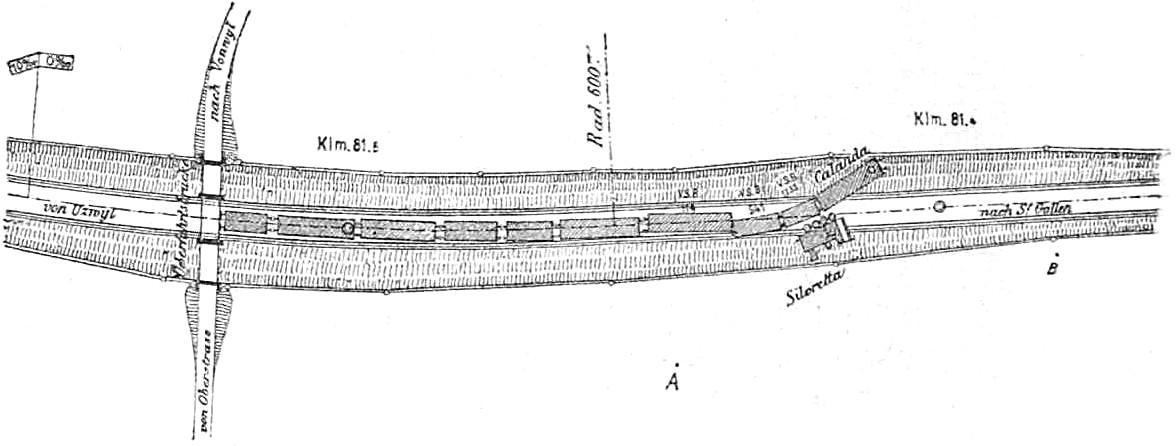 Im Bereich der Unfallstelle in St. Gallen-Vonwil liegt die Bahnstrecke in einer Kurve von 600 Meter Radius und in einem wasserreichen Einschnitt mit torfigen Boden im Scheitelpunkt zweier Gegengefälle von 10 ‰.